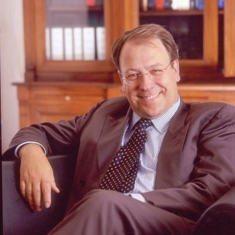 Christoph Ehlers